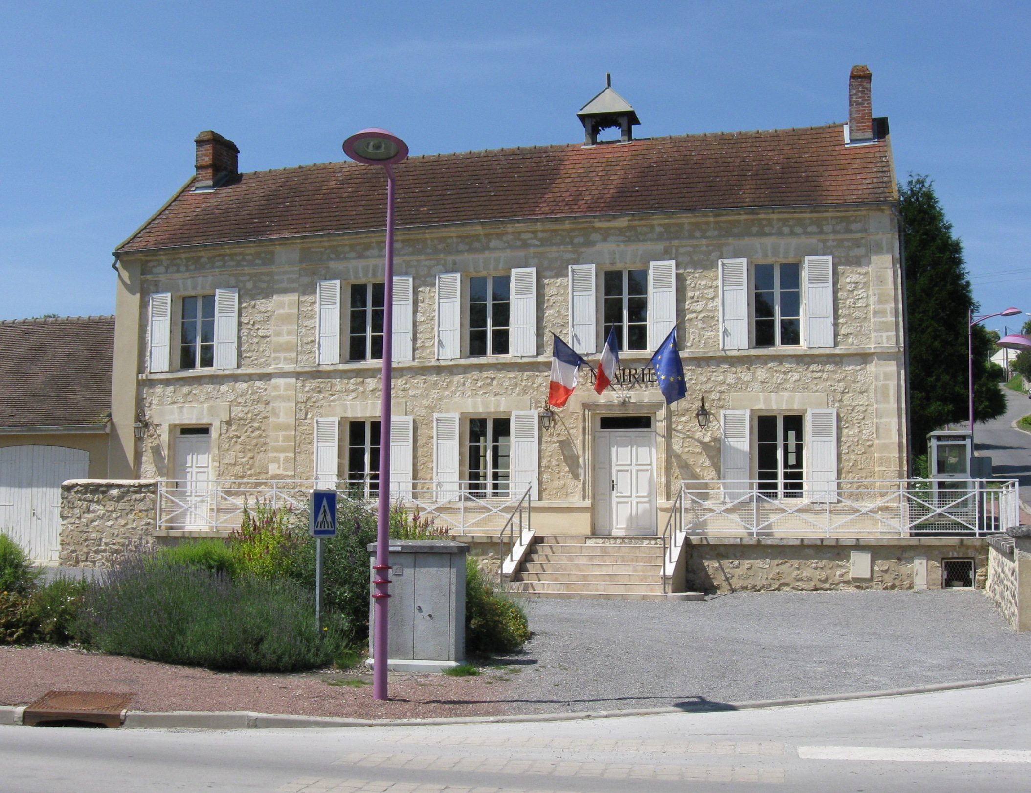 Mairie de Silly-la-Poterie. (département de l'Aisne, région Picardie).